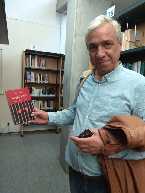 "UAM, Departamento de estudios árabes e islámicos, April 2019"